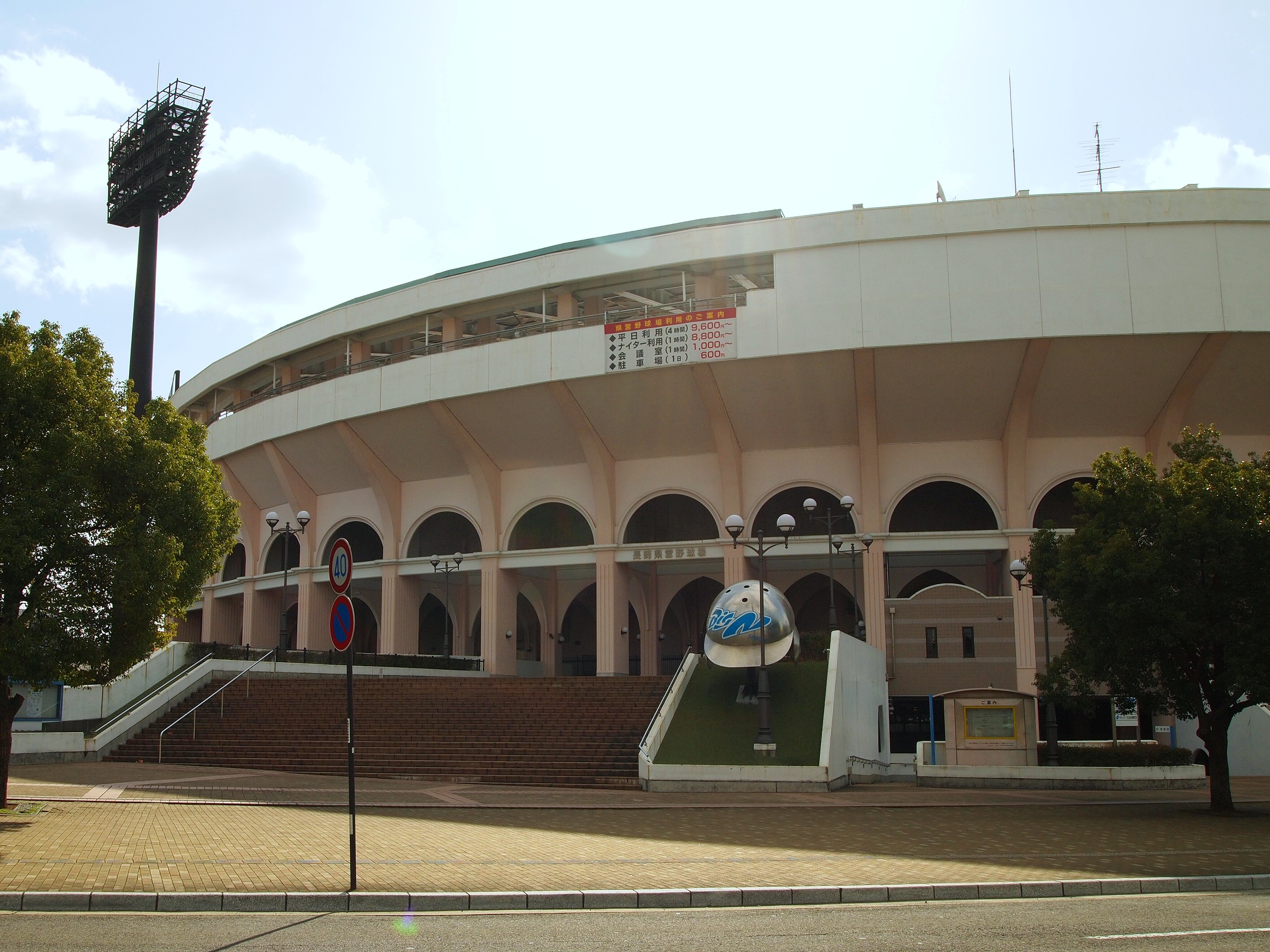 長崎県長崎市にある長崎県営野球場